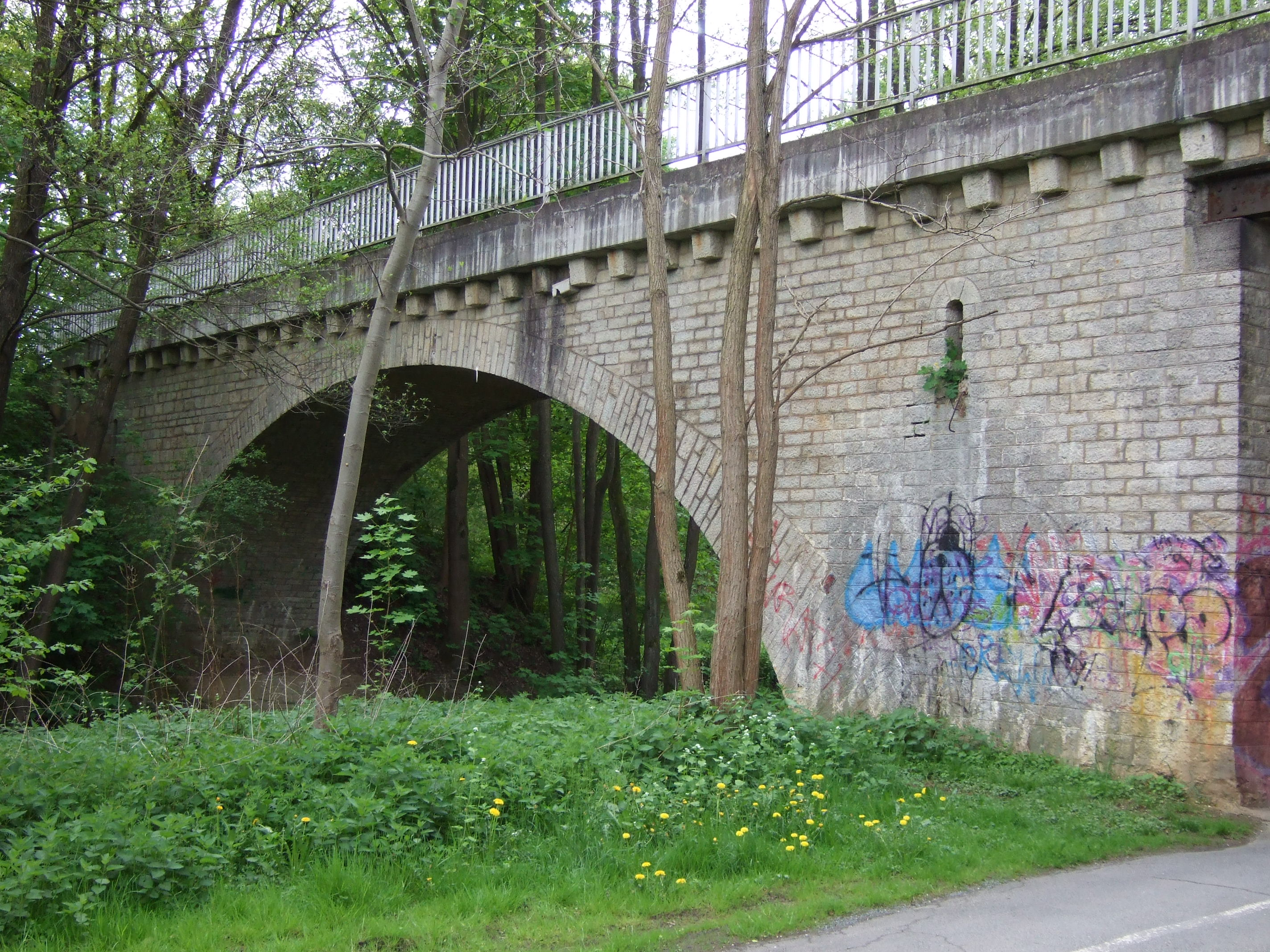 Bahnbrücke über den Mistelbach Bayreuth